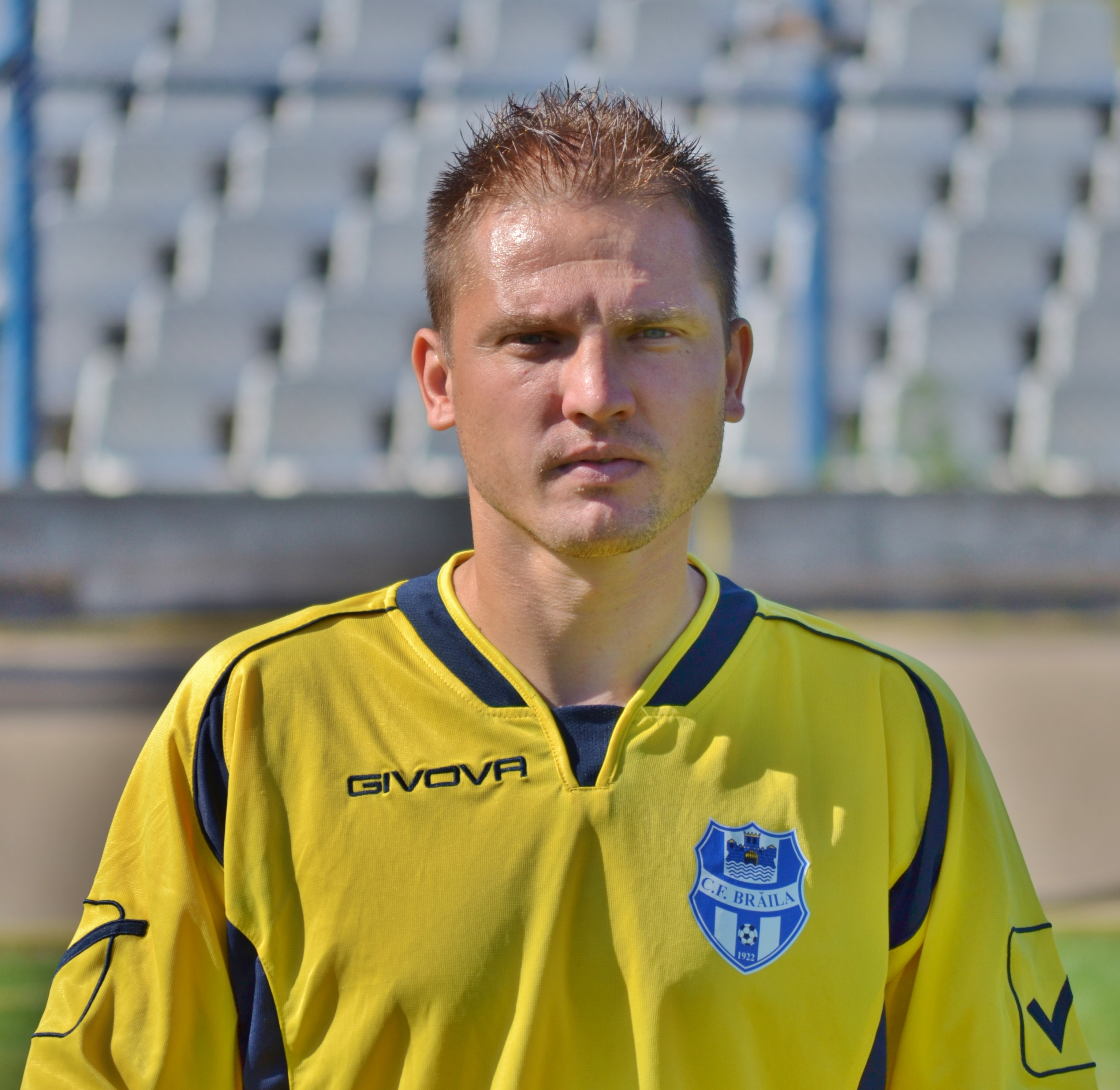 Portret Marius Onofras